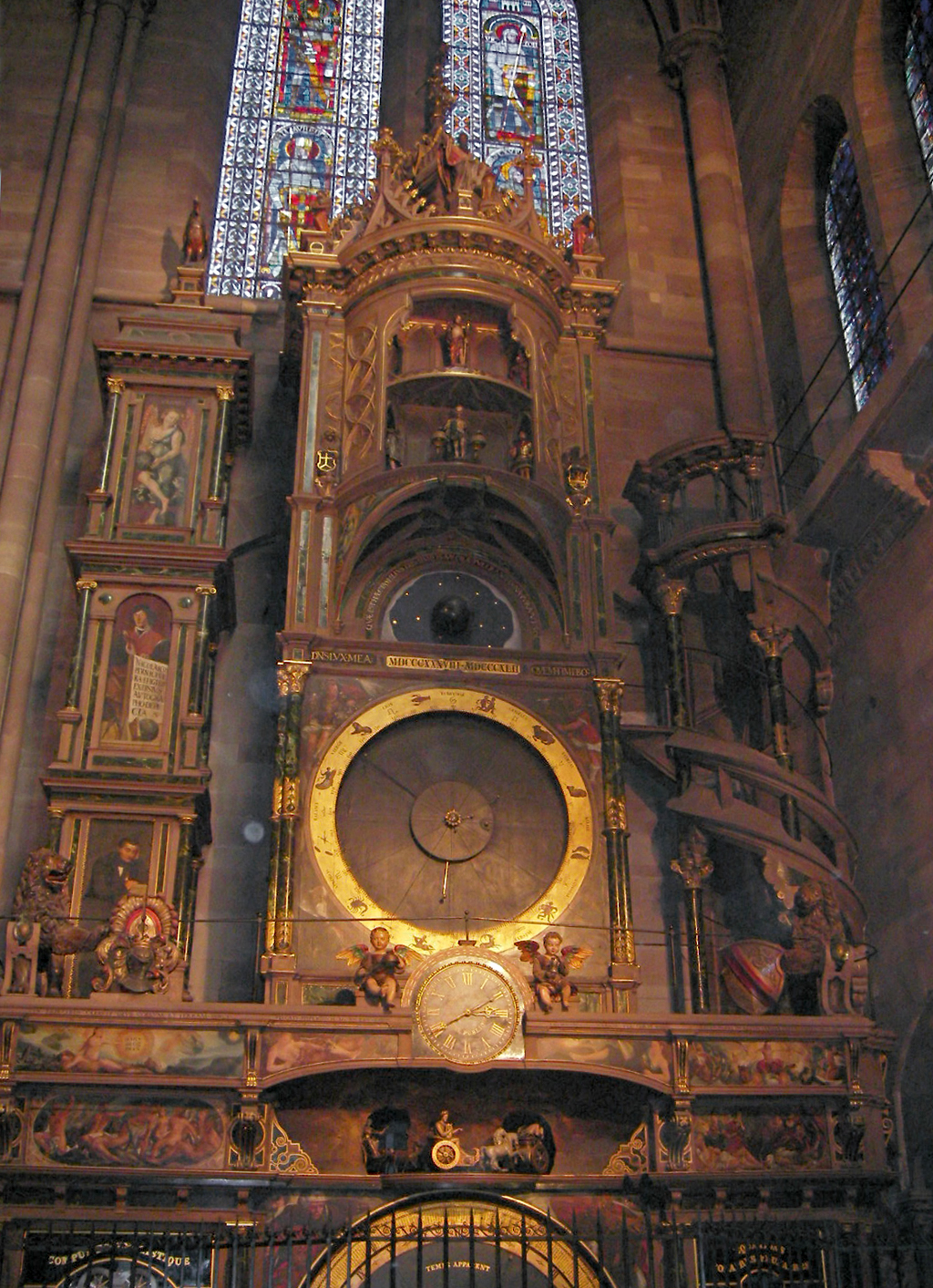 Cathédrale Notre-Dame de Strasbourg